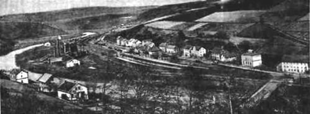 Ortsteil Neubrucke um 1880 mit Eisenhütte und Schornsteinen.